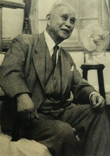 宮原清